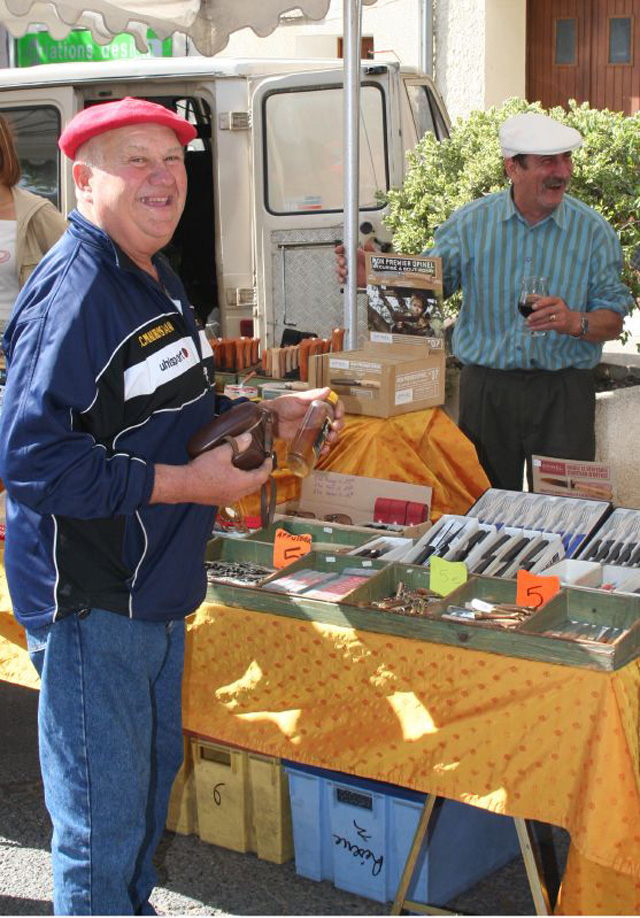 Toast au marché de Bédoin